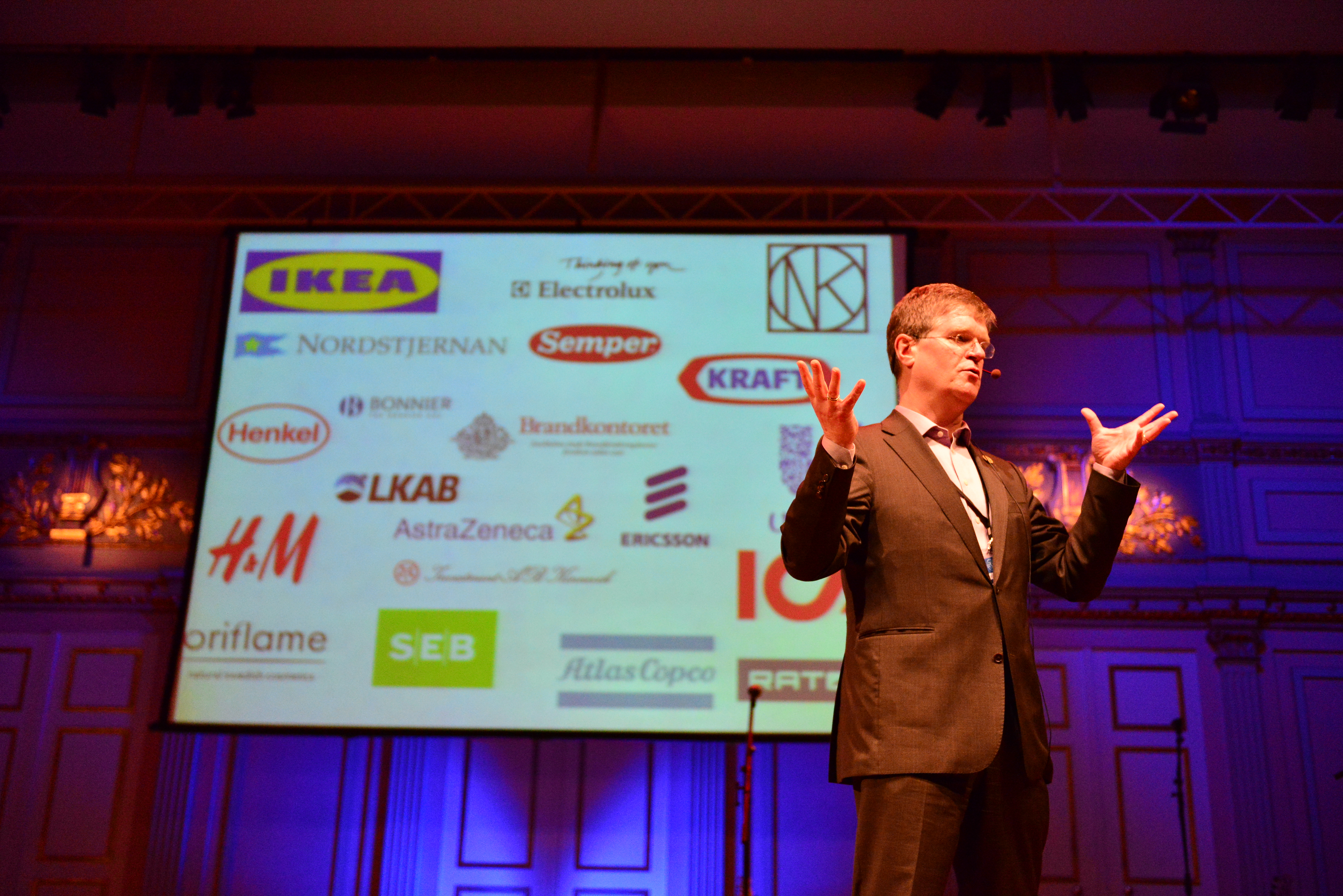 Svenska Publishingdagen 23 oktober 2013. Alexander Husebye, VD på Centrum för Näringslivshistoria.